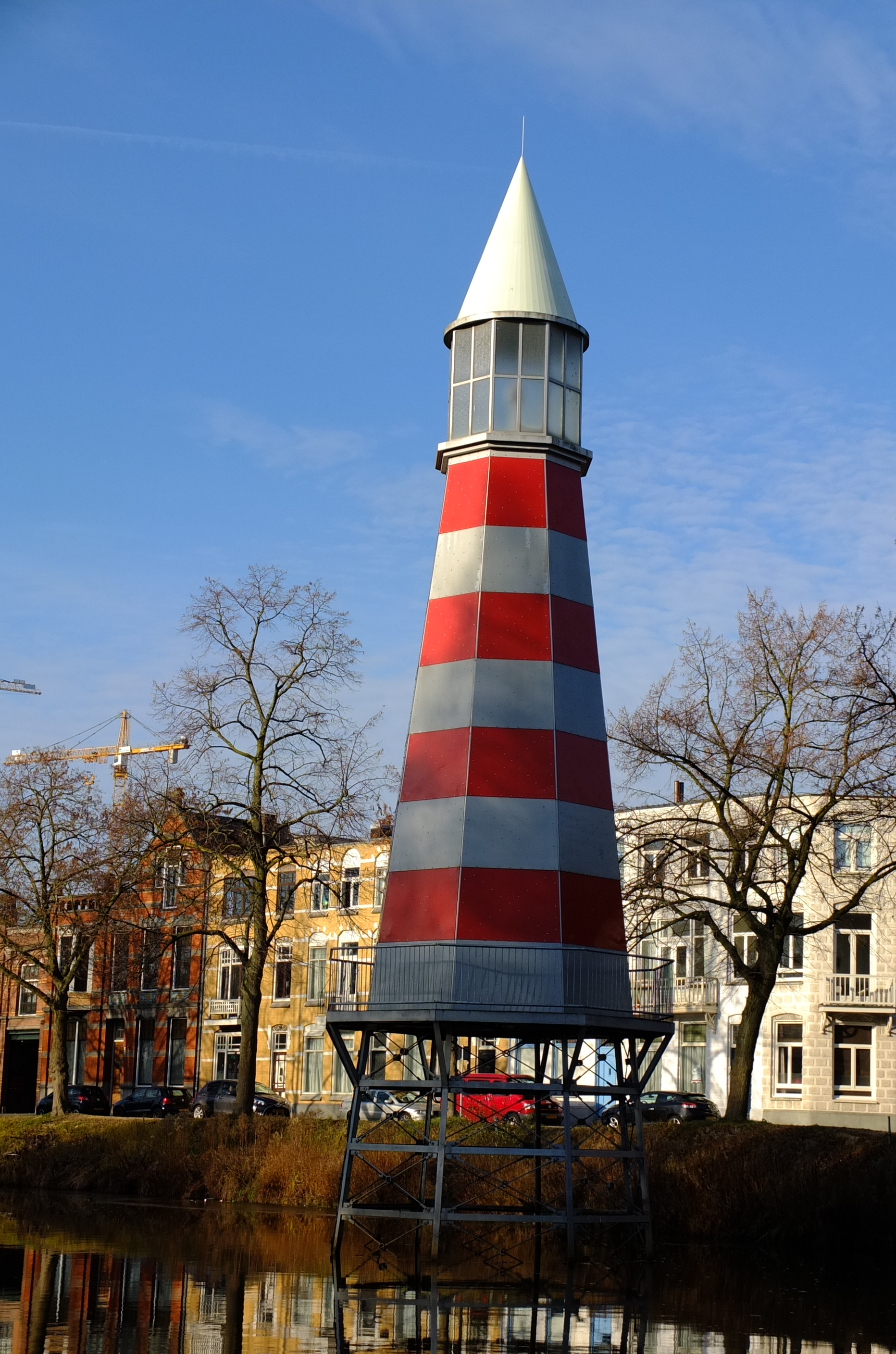 Zicht op de vuurtoren van de kunstenaar Aldo Rossi in de Academiesingel. Met daar achter zicht op de woningen aan de Academiesingel. Niet van het Park Valkenberg en het Station Breda